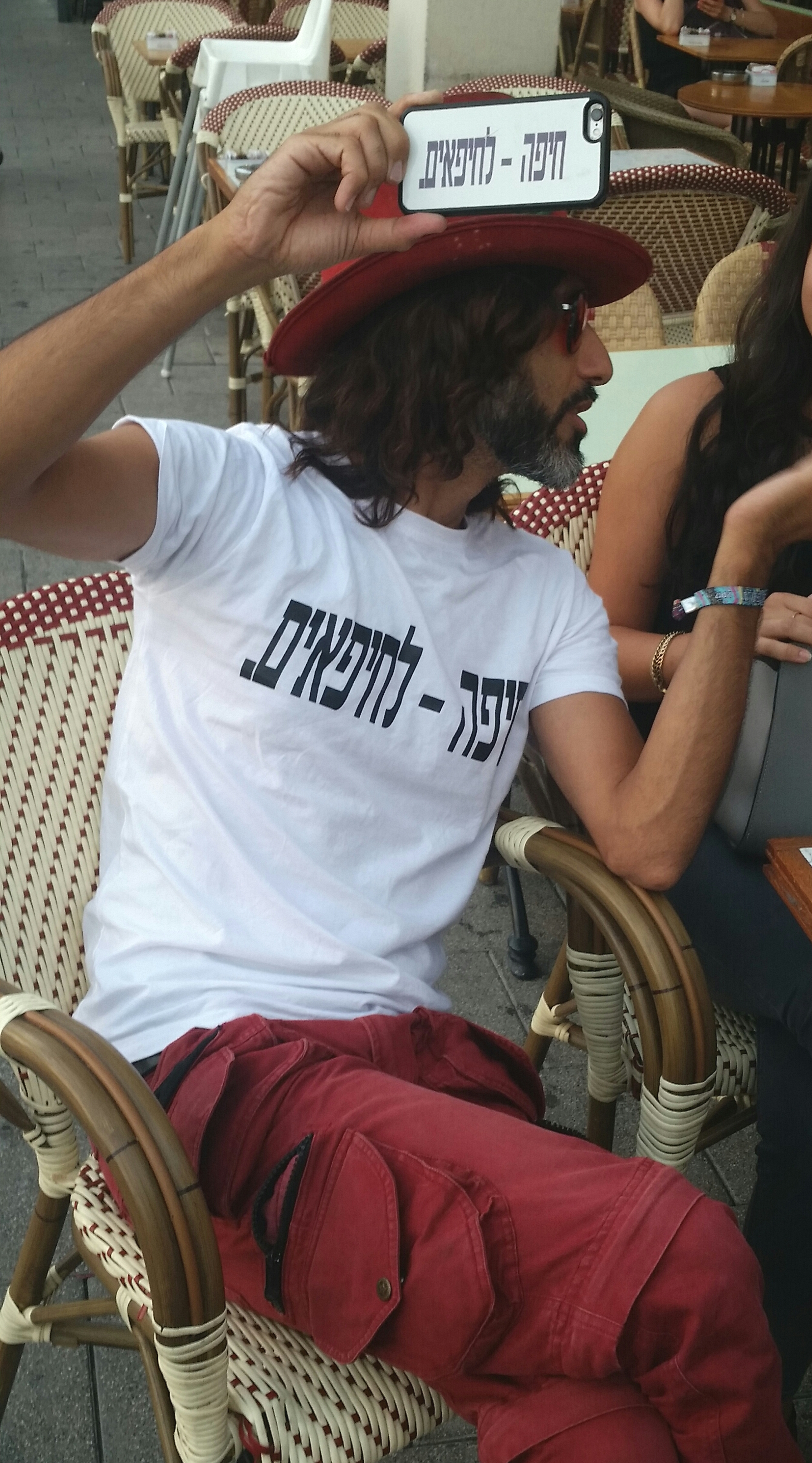 גדי וילצרסקי, אוגסט 2017 בתלאביב